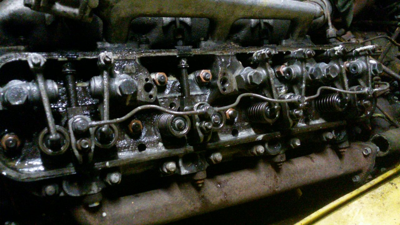 Головка блока цилиндров двигателя ЯМЗ-238